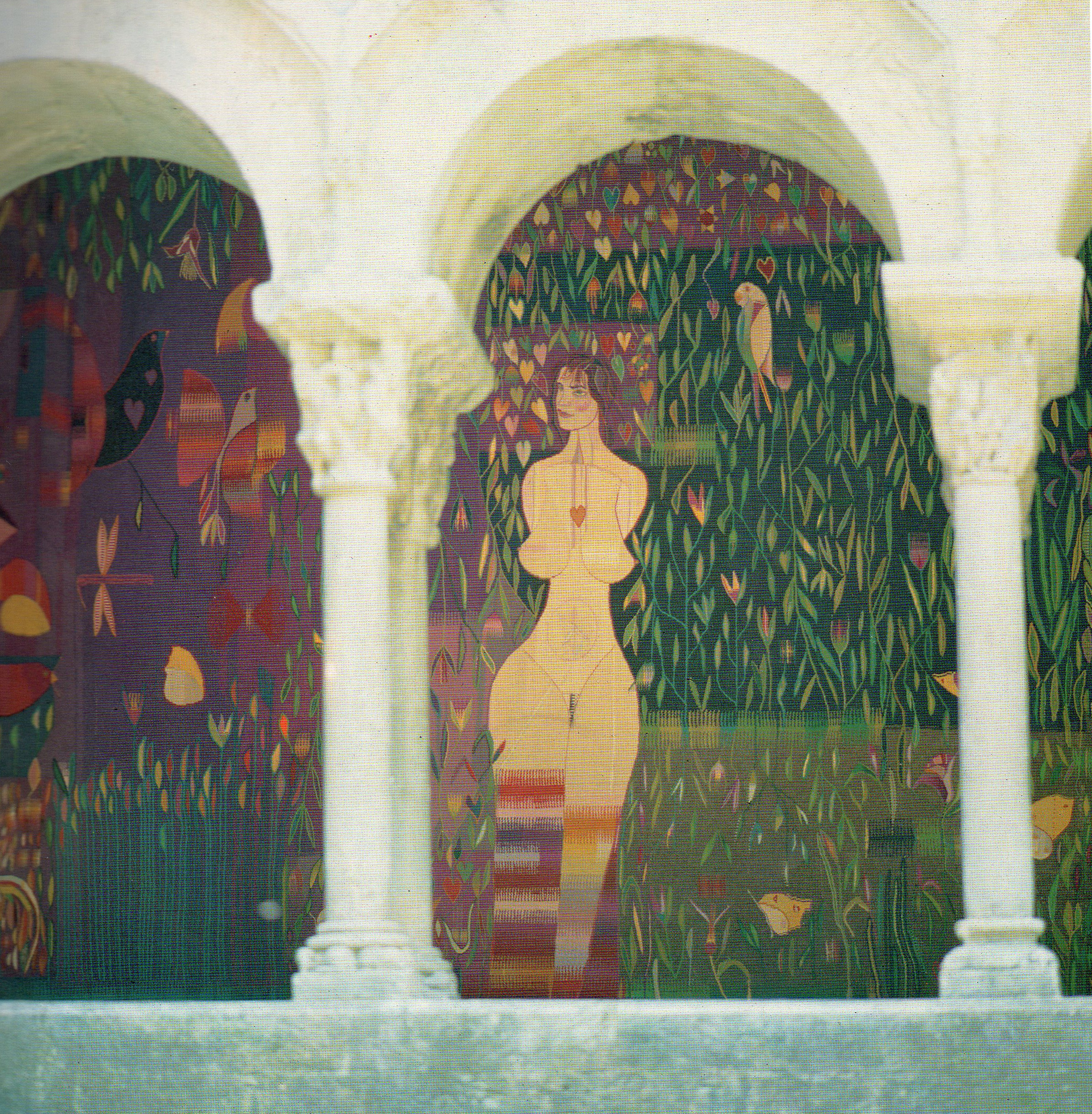 "L'Empordanet", fragment tapís, 350x700 cm., Carles Delclaux, 1981